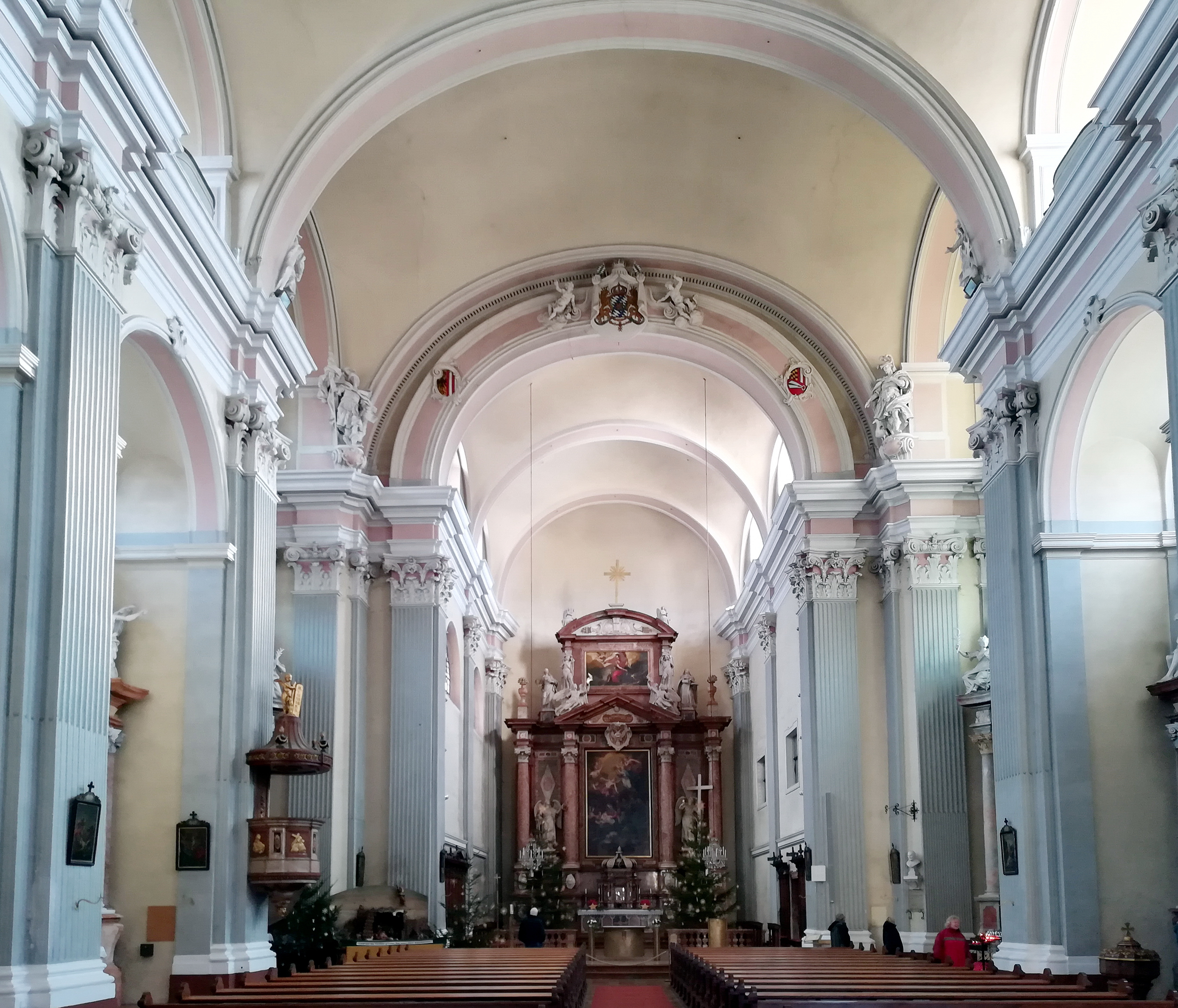 Die Stadtpfarrkirche Schärding befindet sich in der Stadt Schärding im gleichnamigen Bezirk Schärding von Oberösterreich (Kirchengasse 6). Sie ist dem Hl. Georg geweiht.